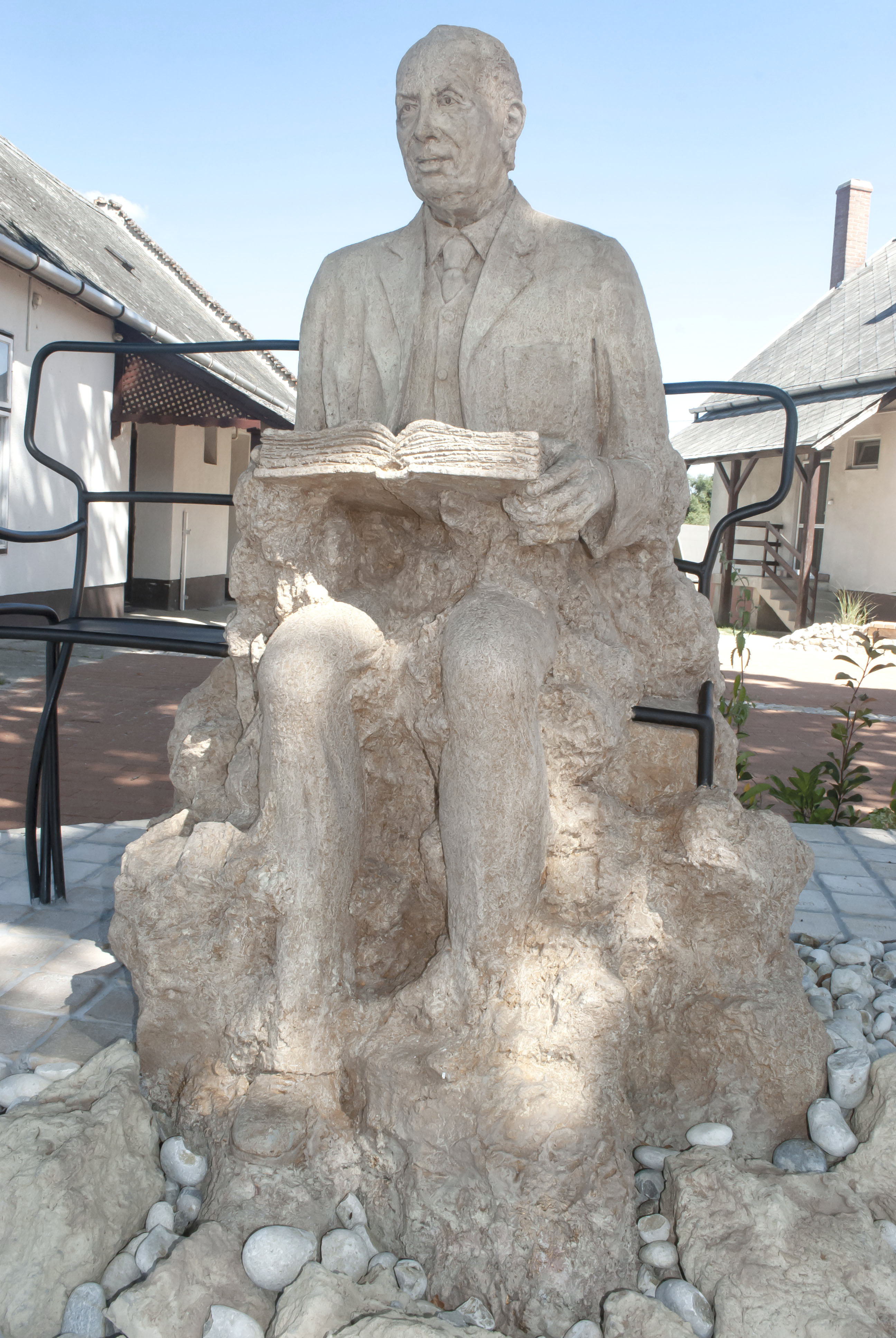 Mádl Ferenc szobra a Veszprém megyei Bándon, 2016. július 31-én avatták fel (Gácsi Barna alkotása)